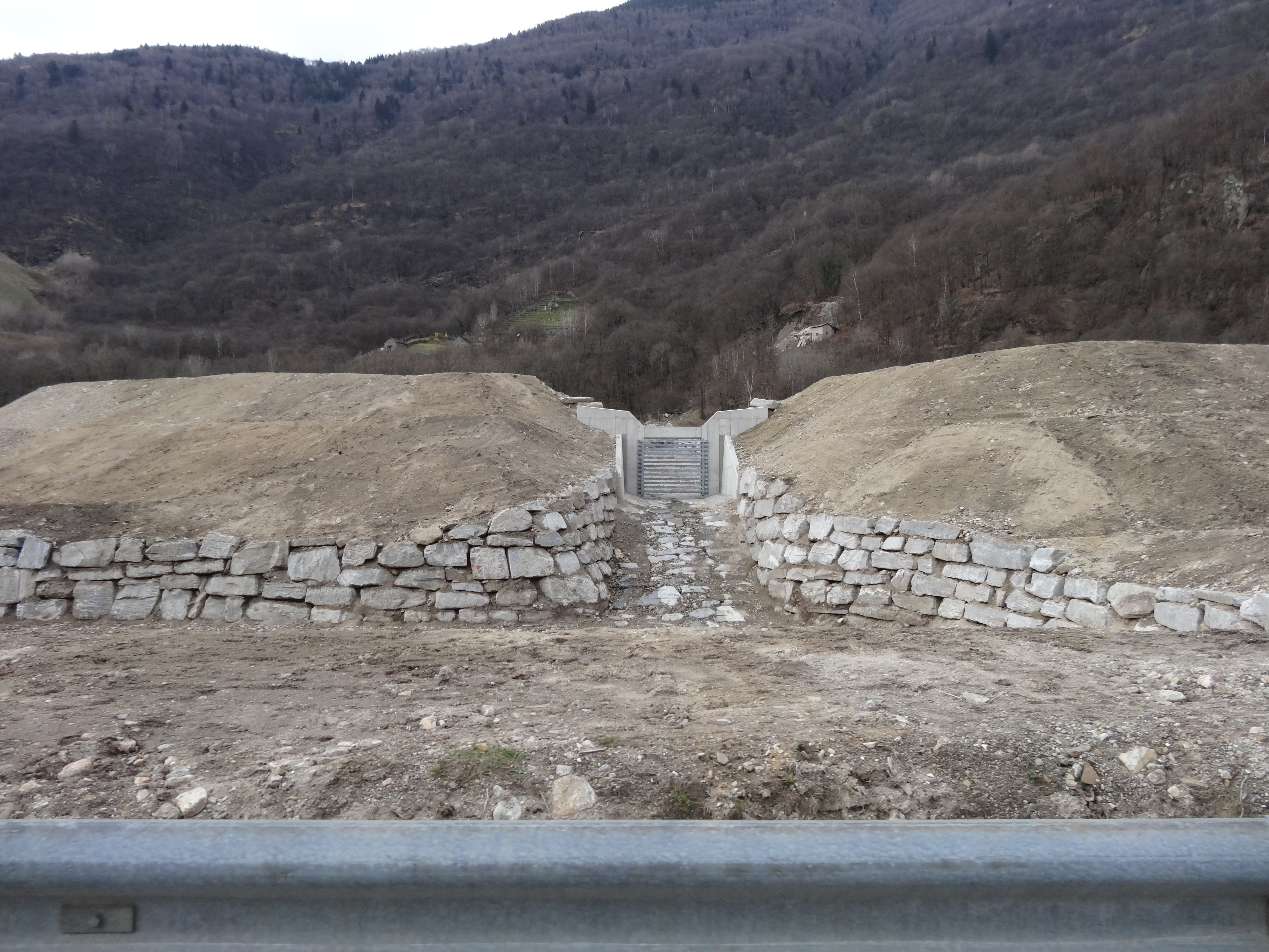 Il nuovo vallo sul Riale Pián Perdásc ultimato nel marzo 2013, che serve a proteggere la strada Cantonale e le industrie sud, fotografato dalla strada Cantonale